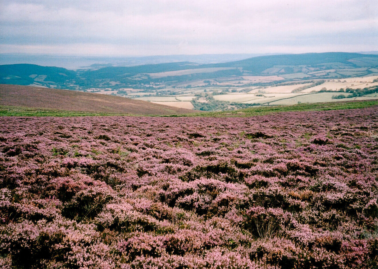 EdSomerset